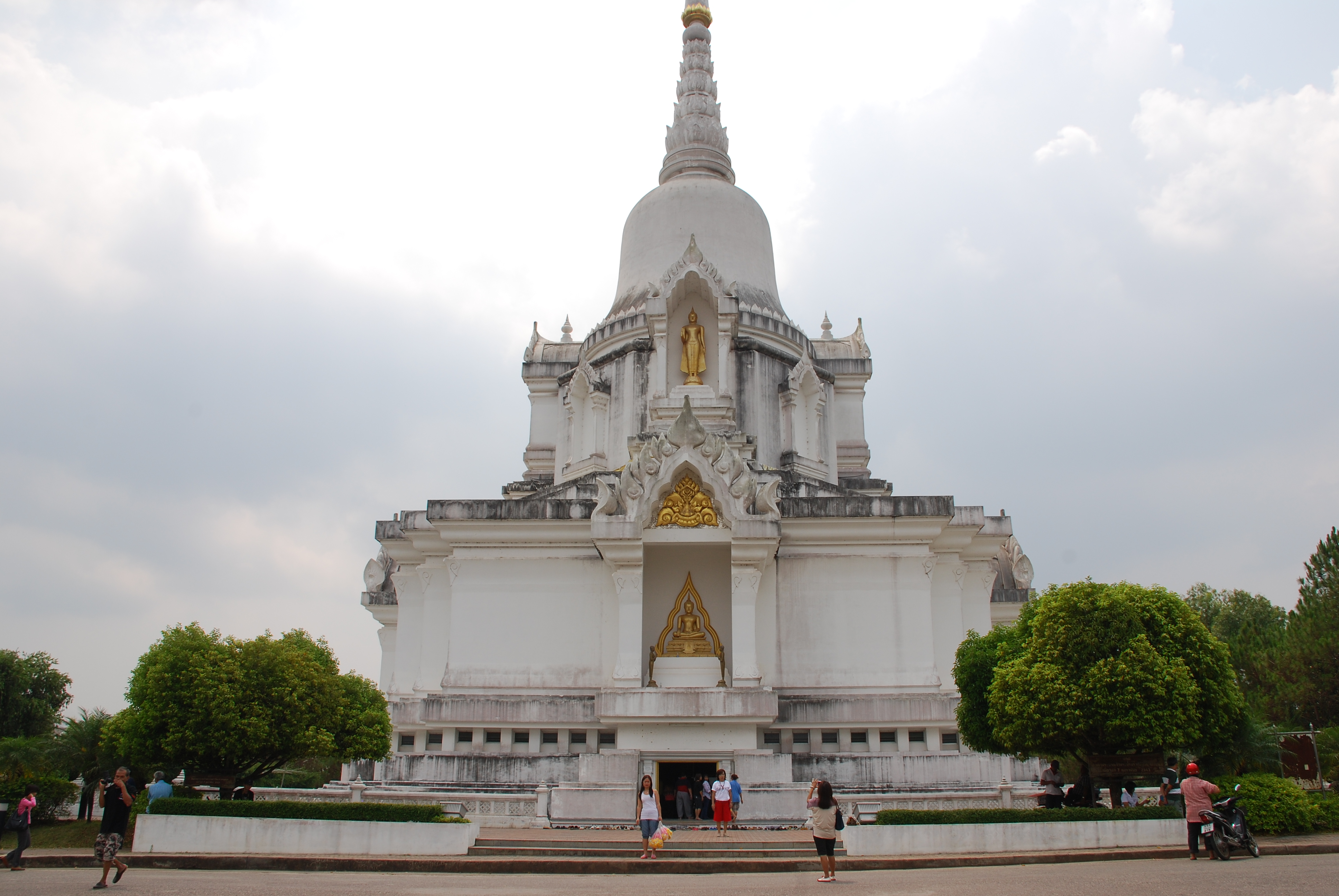 Tempelet i Khao Kho